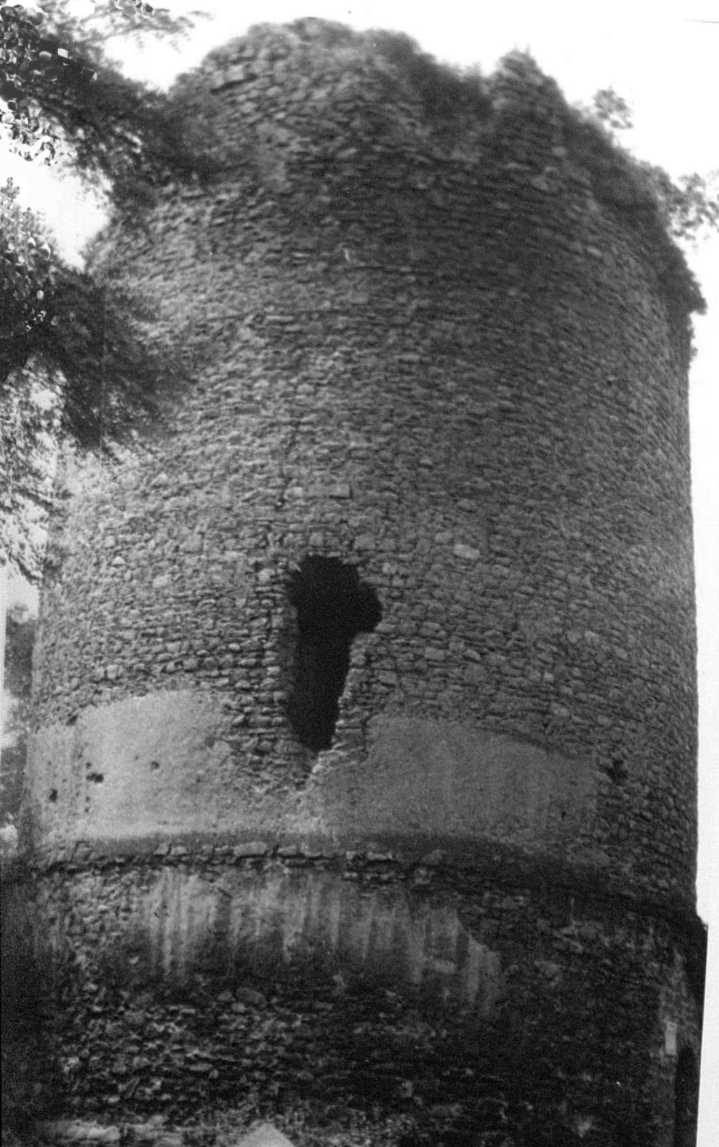 Tower in Czchów, XII cent.